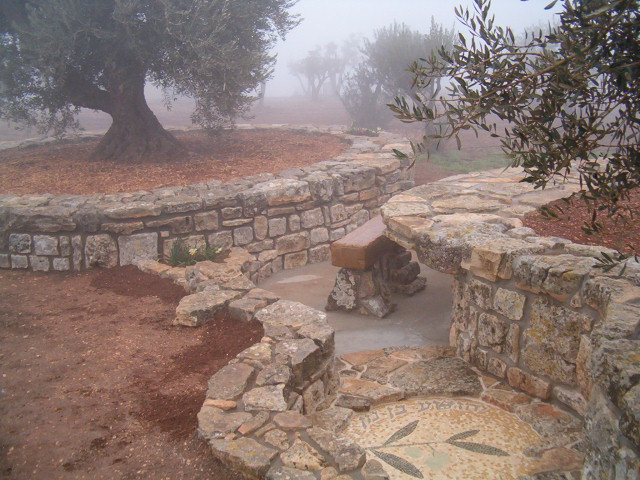 קטע מגלעד יהושע בו נון